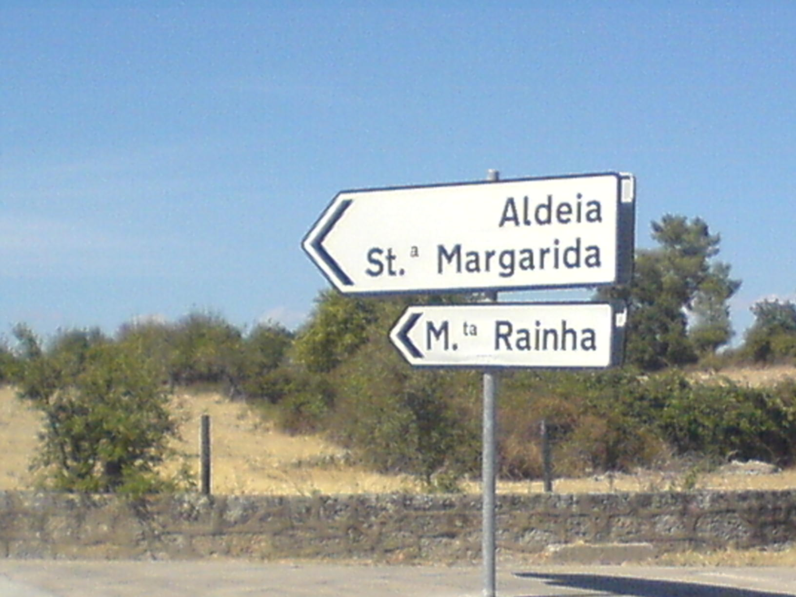 Cruzamento da Nacional 233